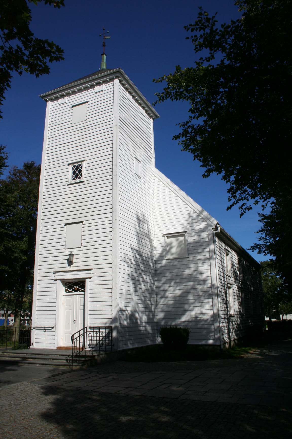 Randaberg Kirche, 1845